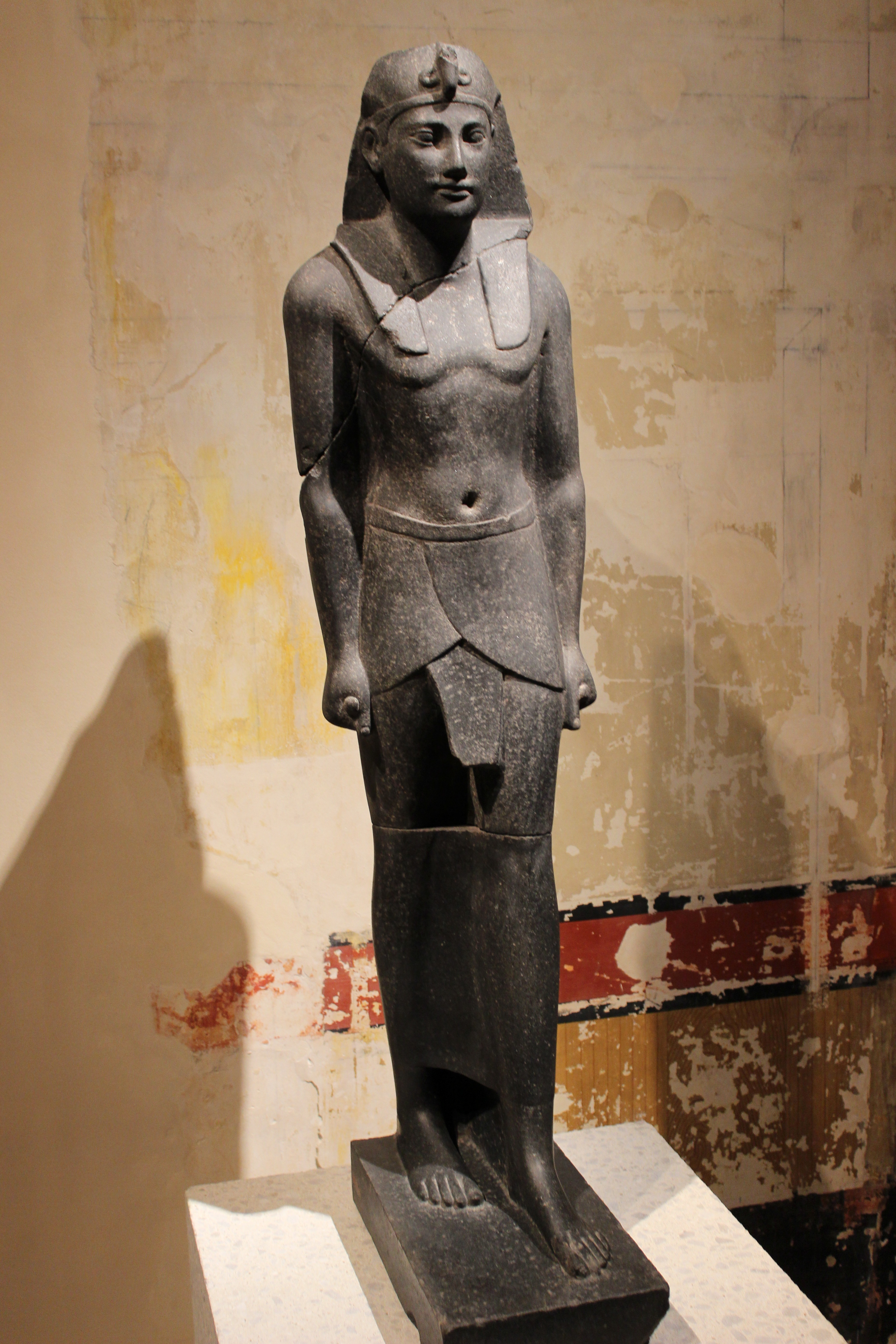 Berlín. Neues Museum. Ptolomeo III.